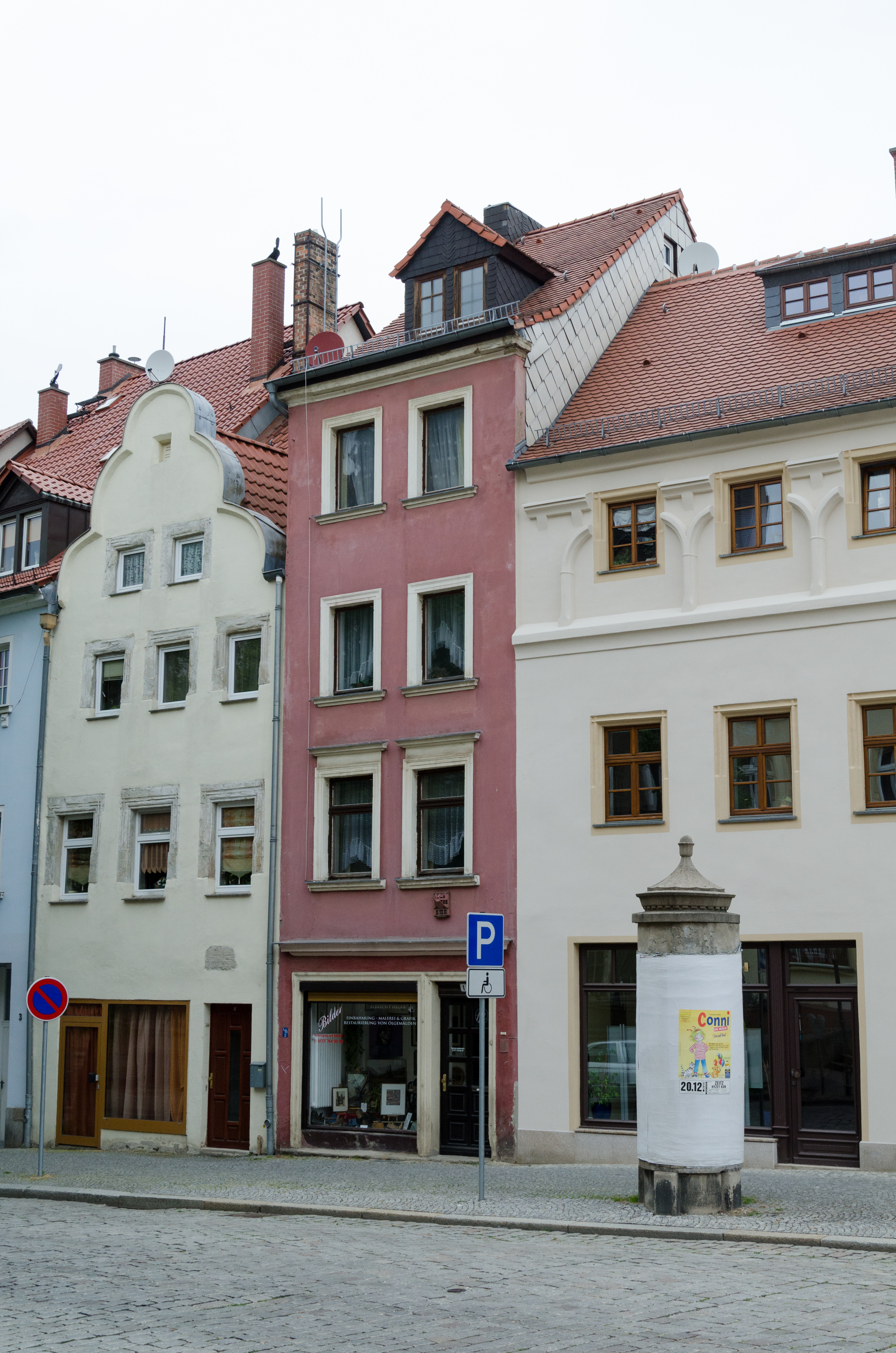 Zeitz, Brüderstraße 1